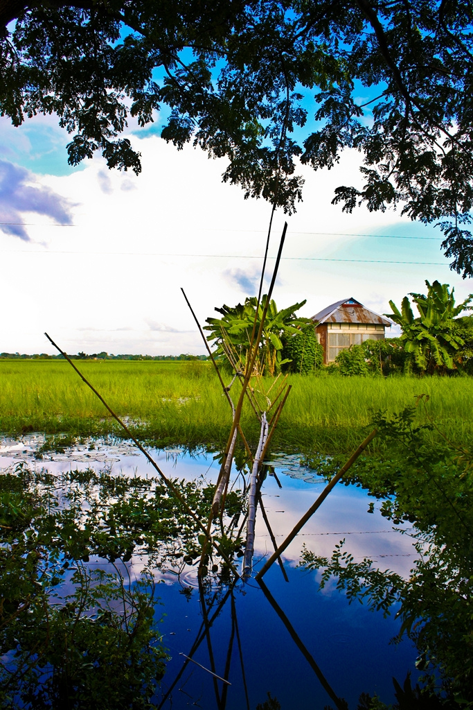 Raipura village (Bengali: রায়পুরা), Bangladesh.